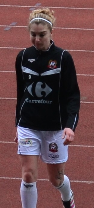 Rencontre du match FCF Juvisy - AS Muret (8/4/2012)